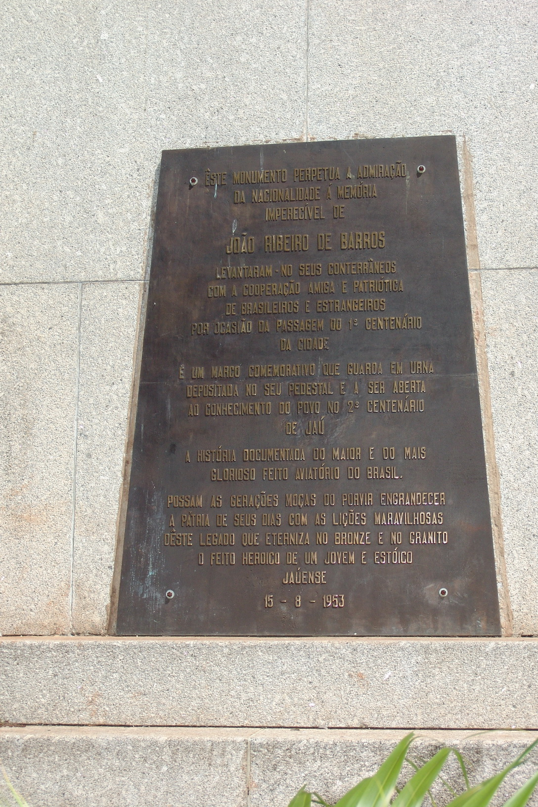 Foto do município de Jaú, São Paulo, Brasil